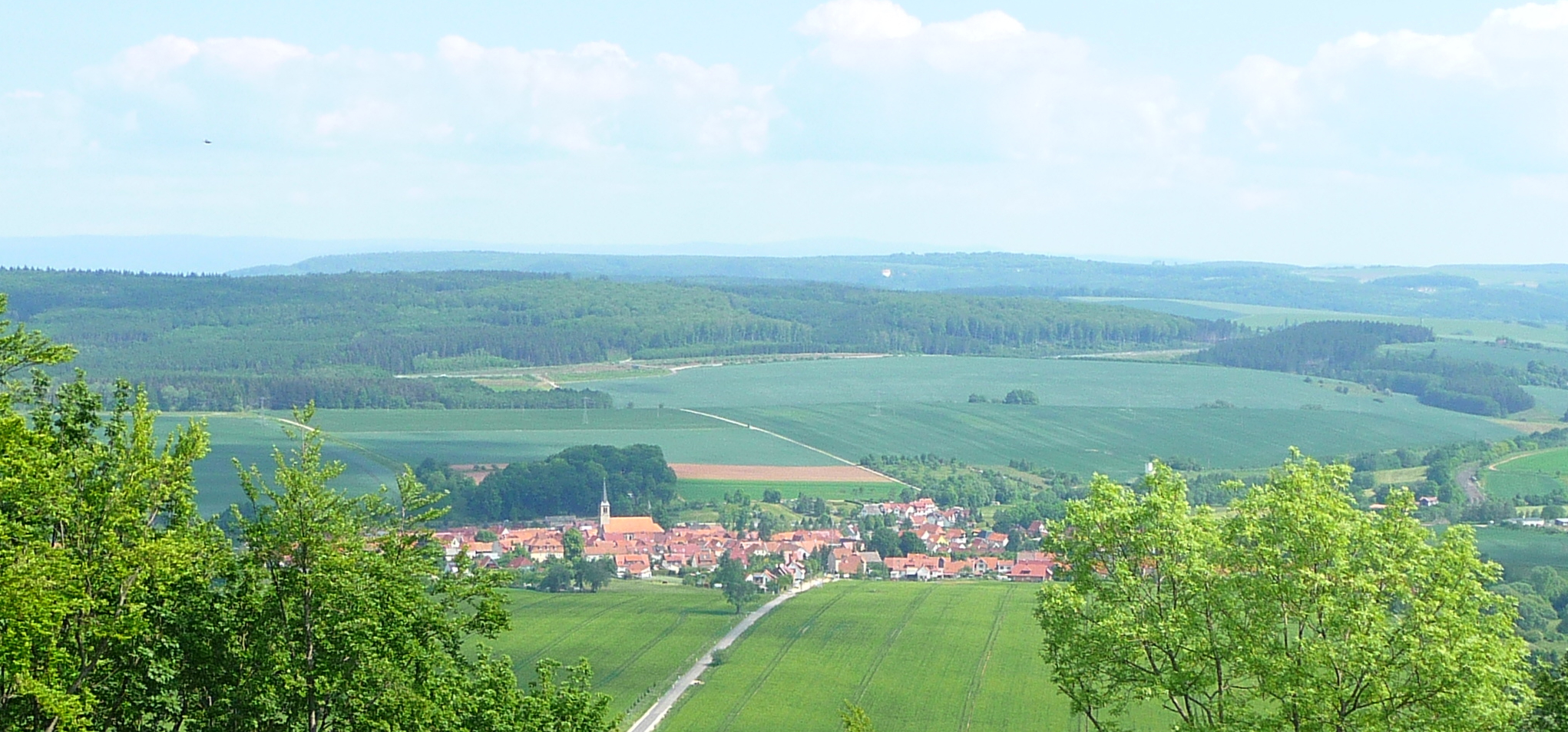 Ausblick von der Burg Scharfenstein auf den Ort Beuren. Im Hintergrund ist der Harz erkennbar.